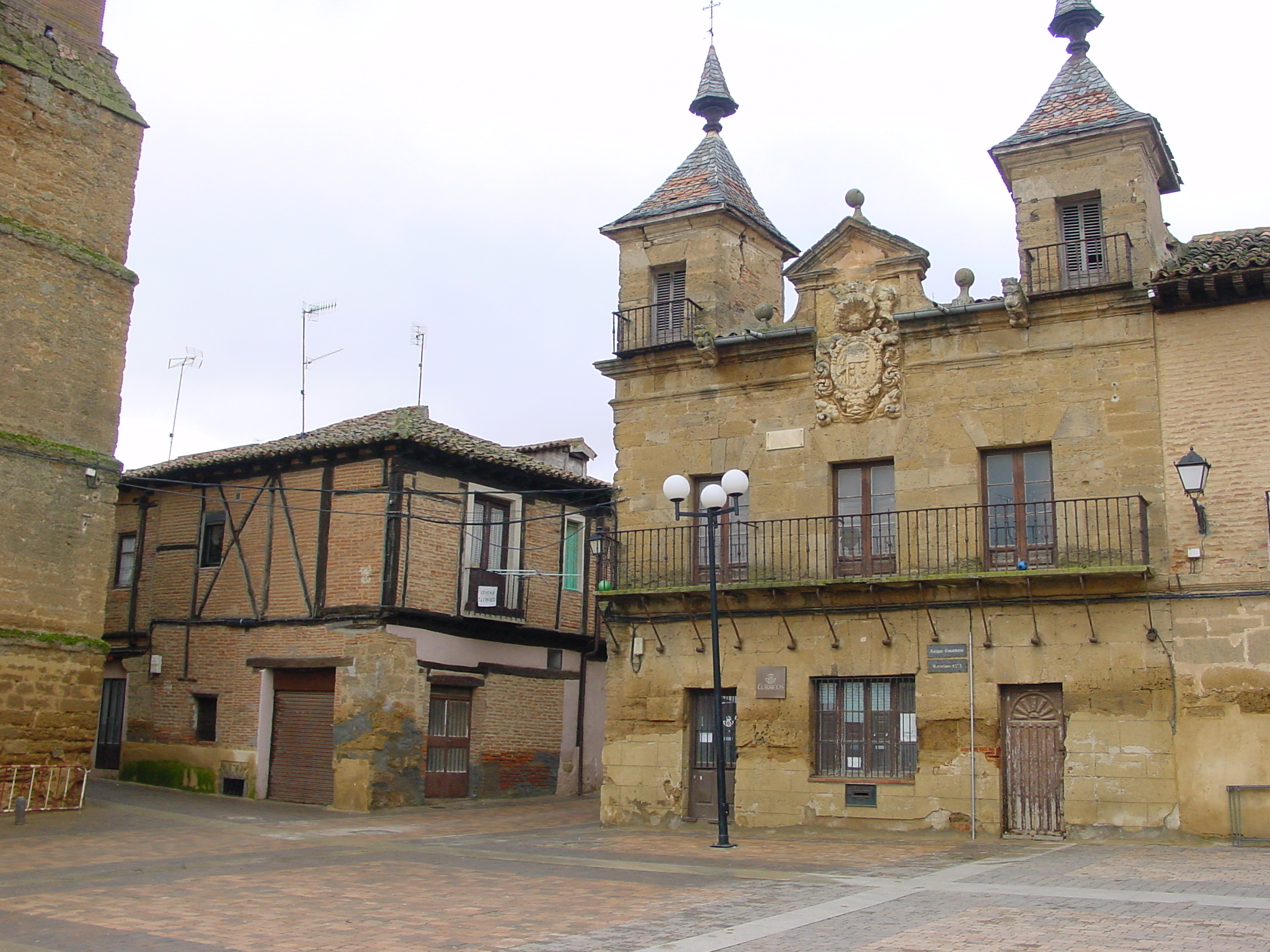 Valderas (León, España). Edificio de correos. Es la antigua casa consistorial. Está situado en la plaza Mayor. Fue edificado sobre el solar donde se supone que estaba la casa de María de Zarzas. Data de 1701 y su estilo es herreriano, con dos torrecillas en los costados, con sendos balcones, rematadas por chapiteles que terminan en estípites. A la izquierda puede verse la casa más antigua de la villa. Autor de la imagen: Lourdes Cardenal, enero 2006.